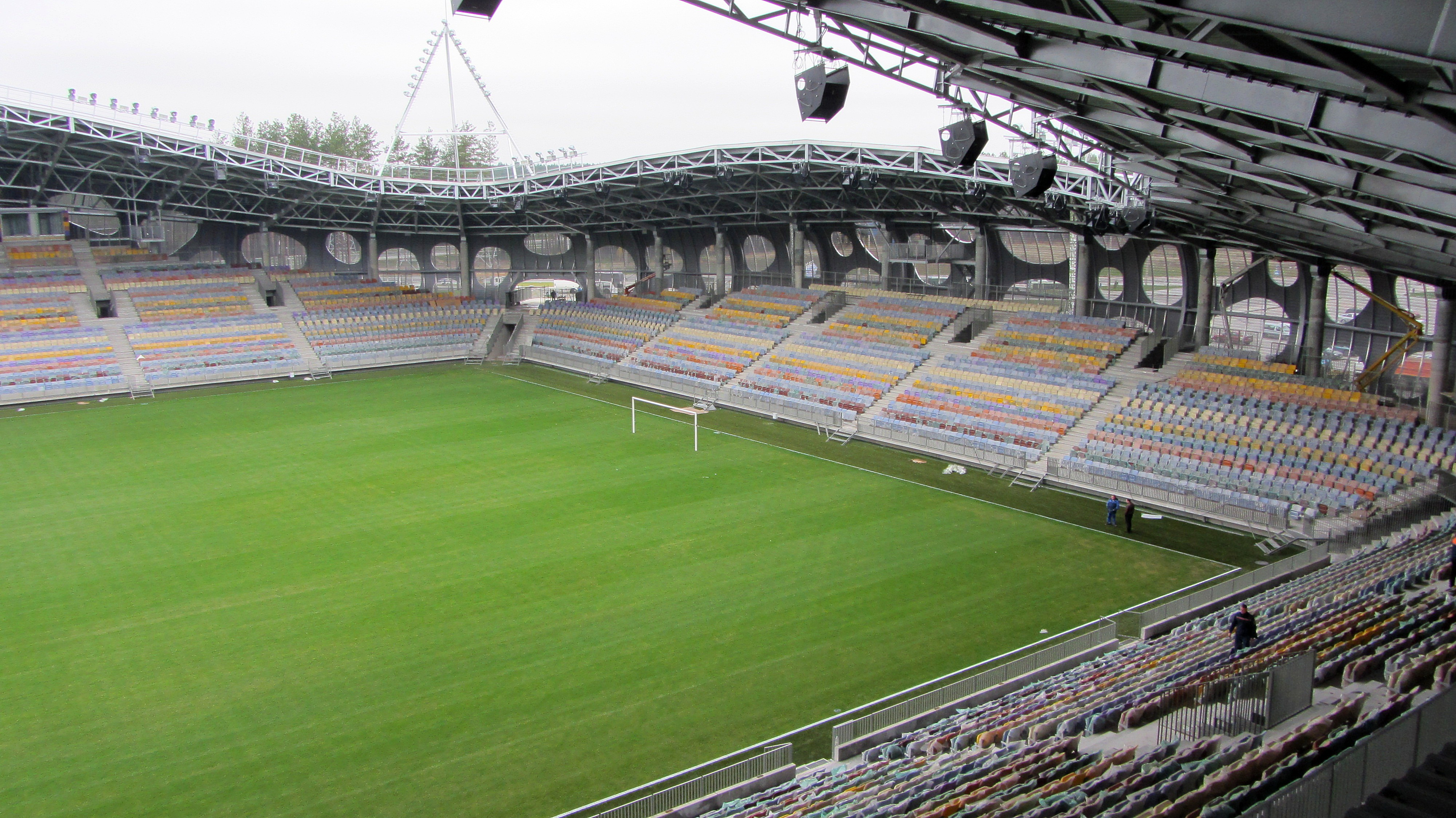 Трибуны Борисов-арены во время строительства